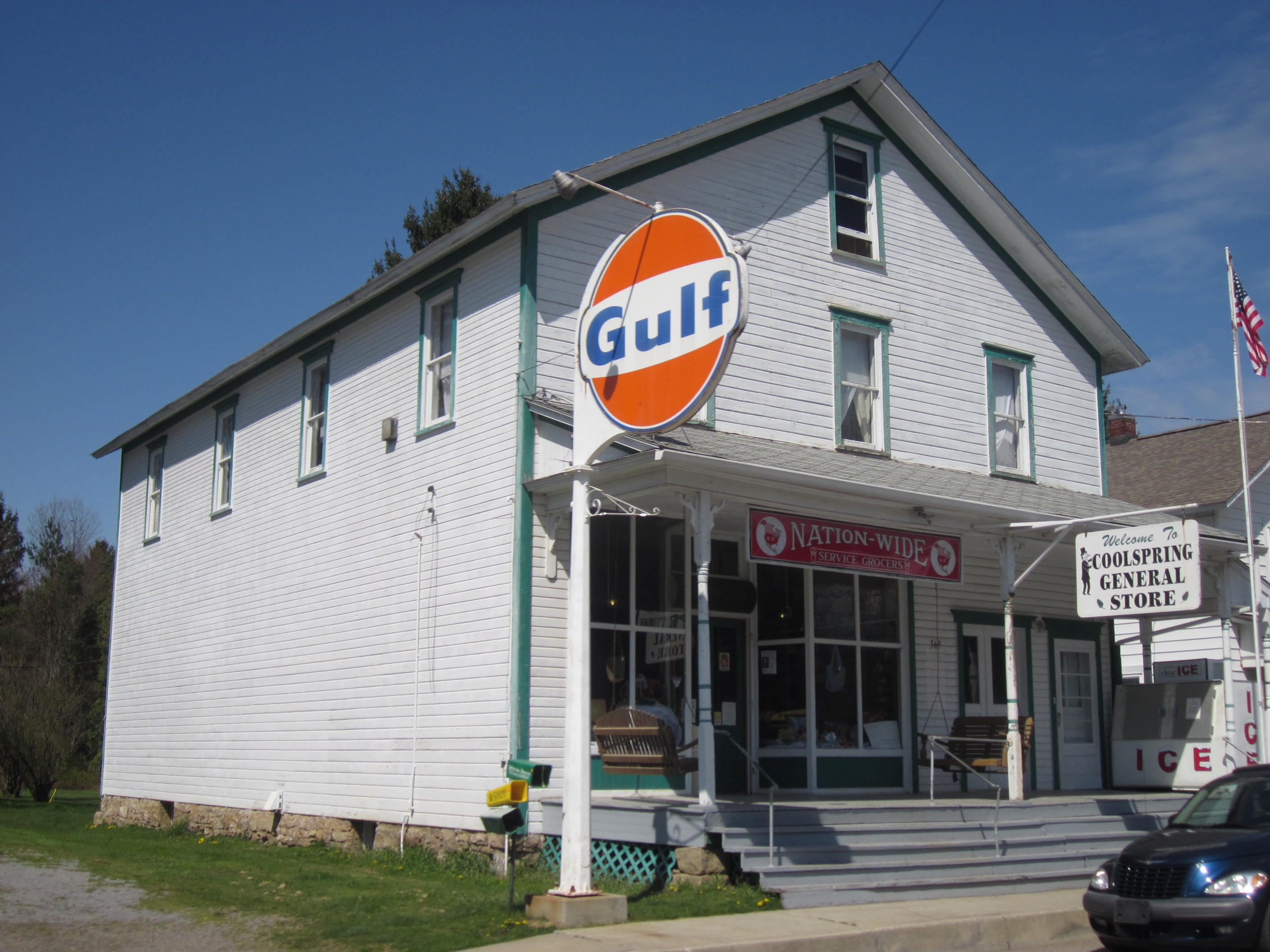 Coolspring, Pennsylvania